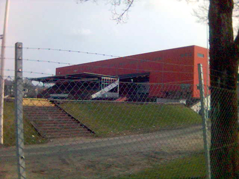 Borås Arena 2005/04/15 och Ryavallen.